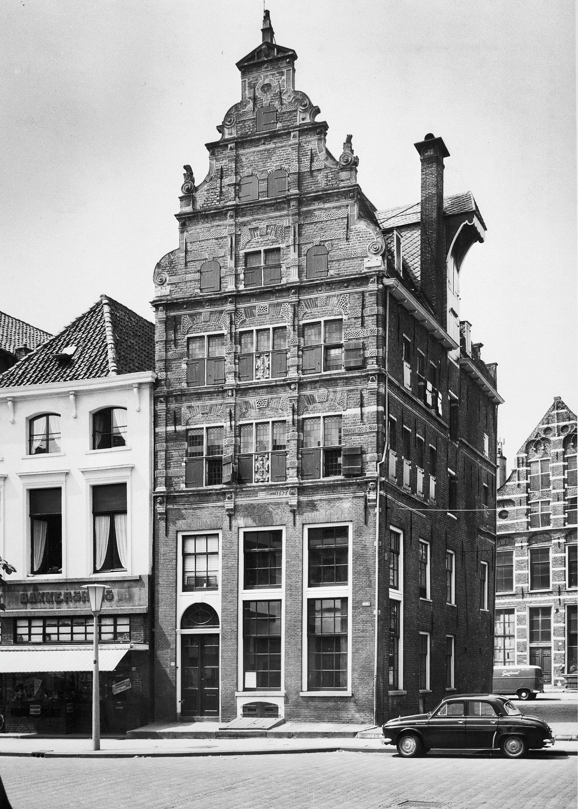 De Drie Haringen: De Drie Haringen